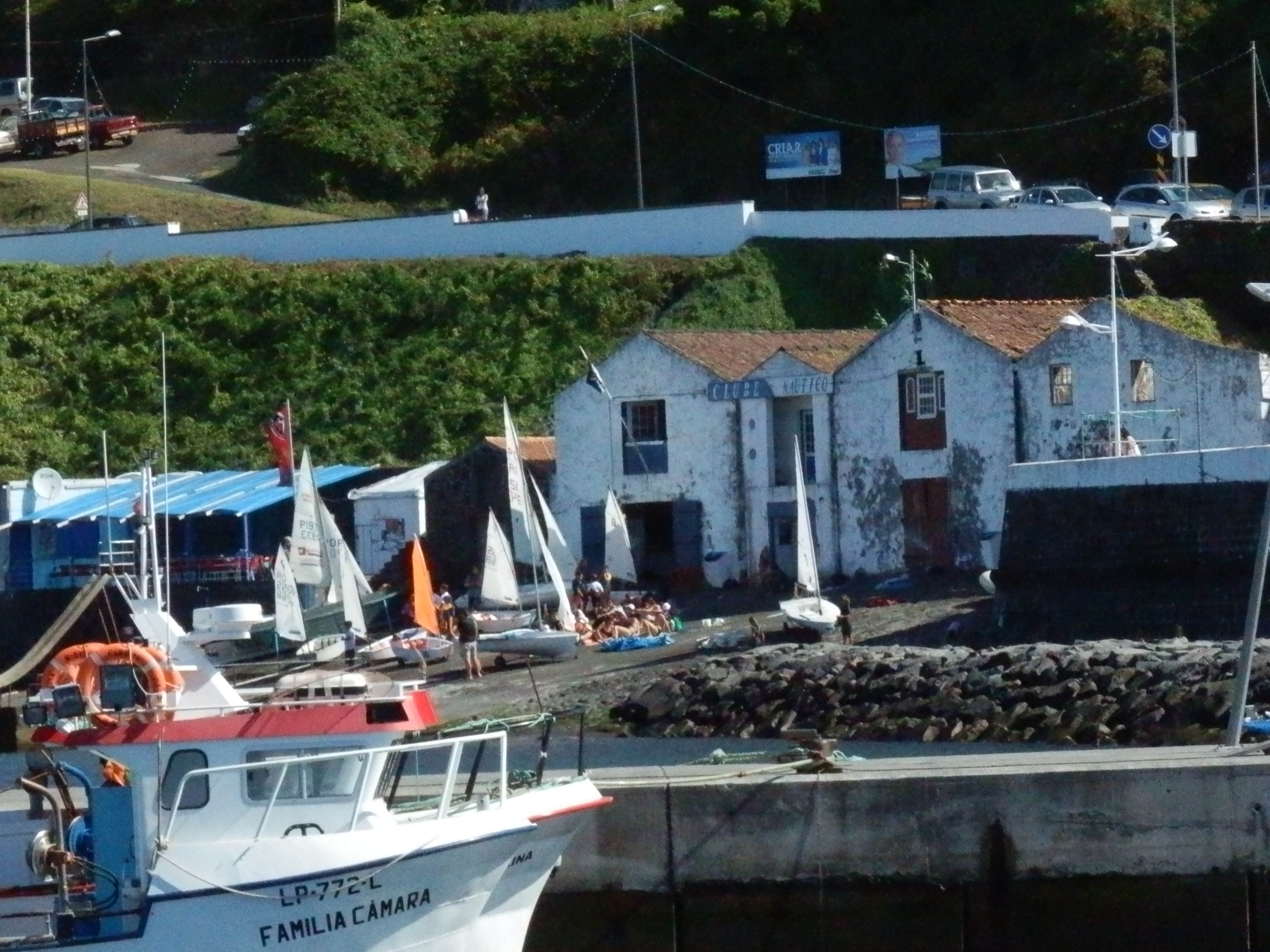 2012 sede cnlp